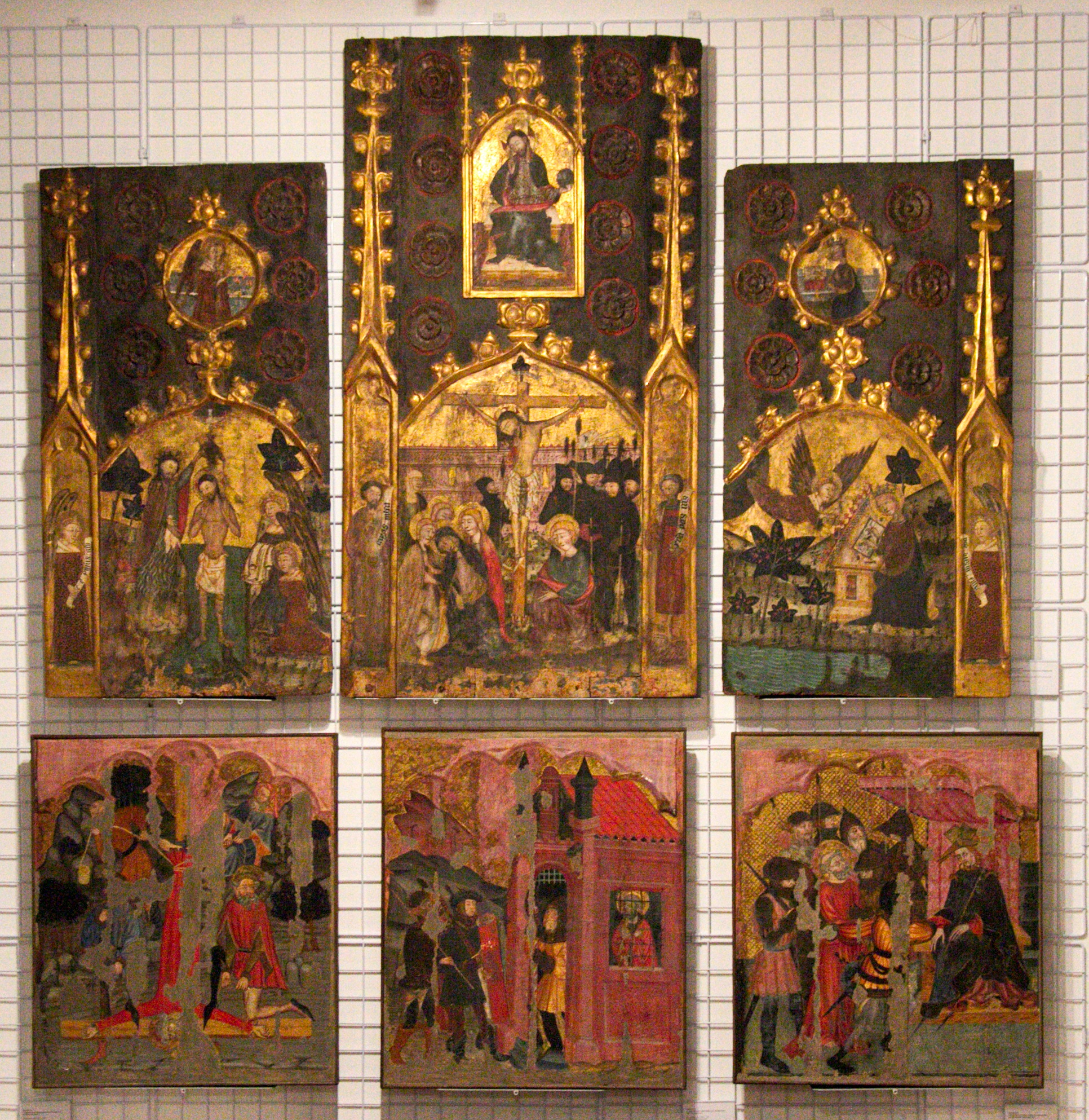 Retaule de Sant Pere, obra de Juan de Leví de Calataiud (1392-1407), actualment al Museu Episcopal de Vic